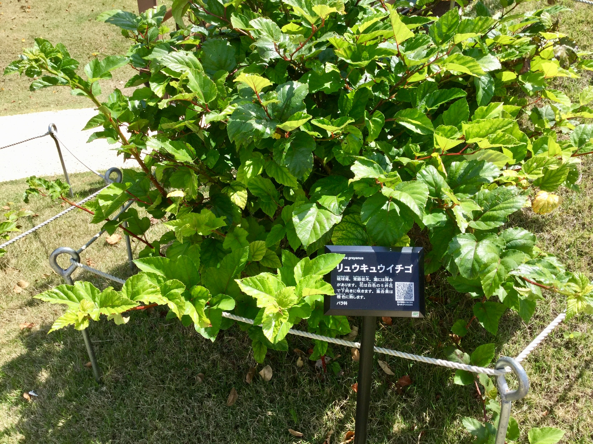 首里城敷地内で展示されているタカイチュビ(ホウロクイチゴ)